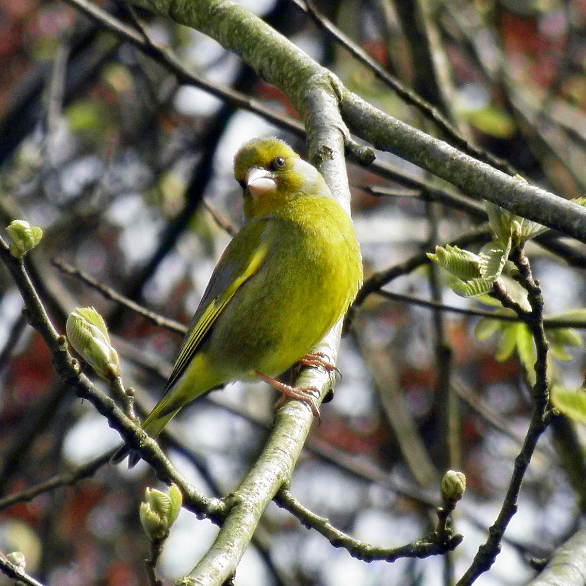 Carduelis chloris